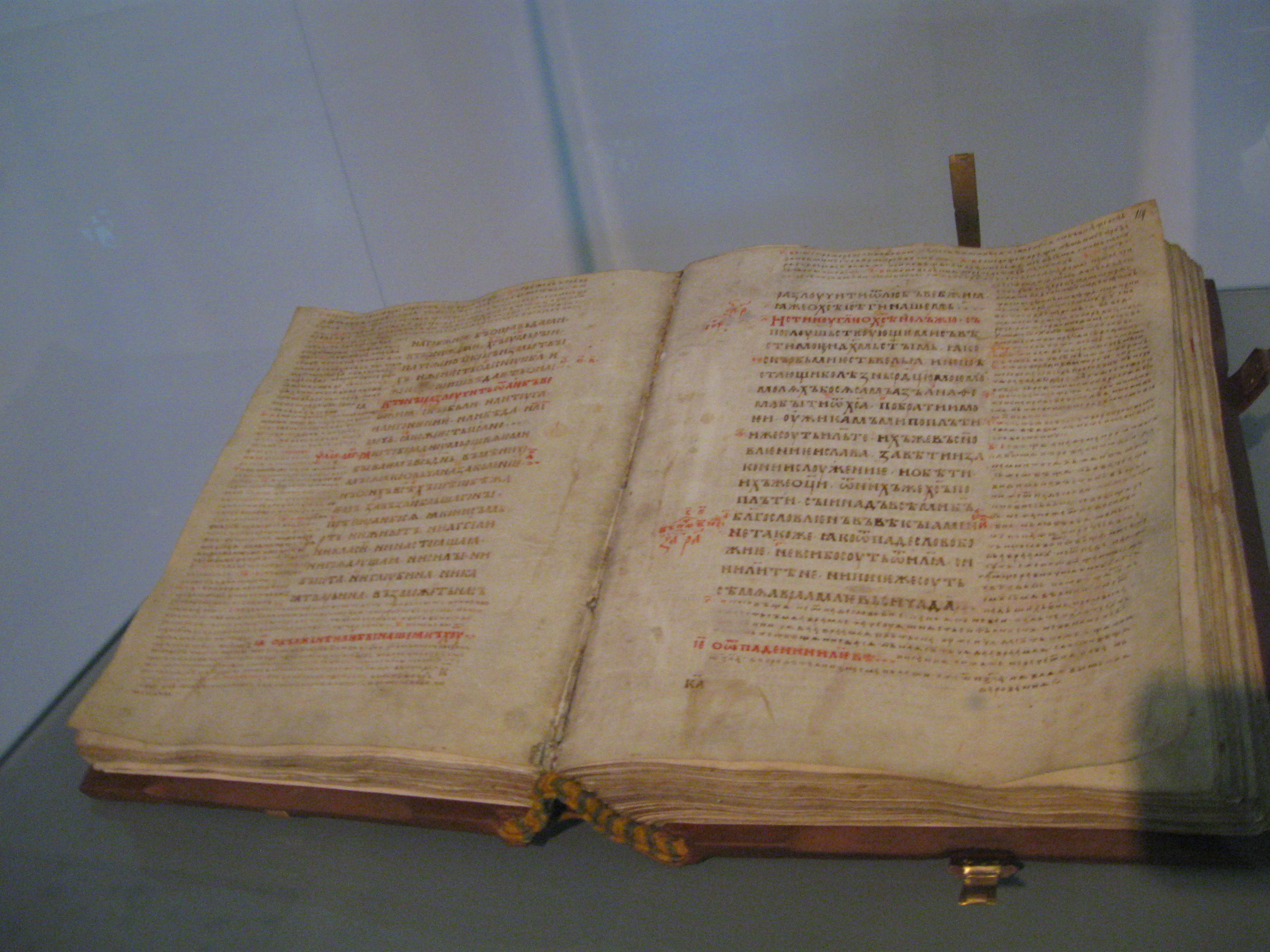 "Кристинопільський Апостол" (ХІІ ст., пергамент, рукопис. Львівський історичний музей) Виставка "Велике і Величне". Мистецький арсенал. 2013